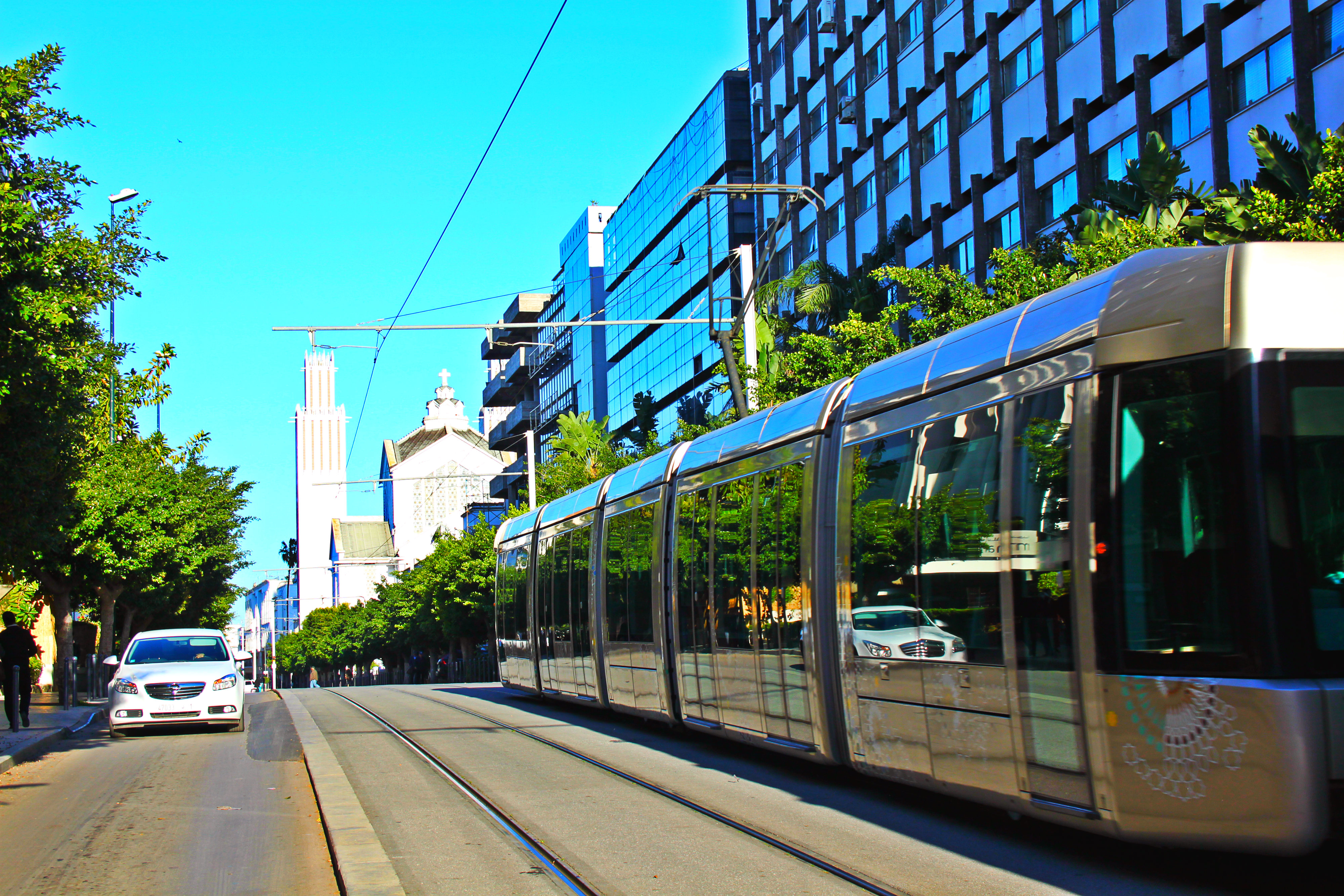 Tramway Rabat-Salé